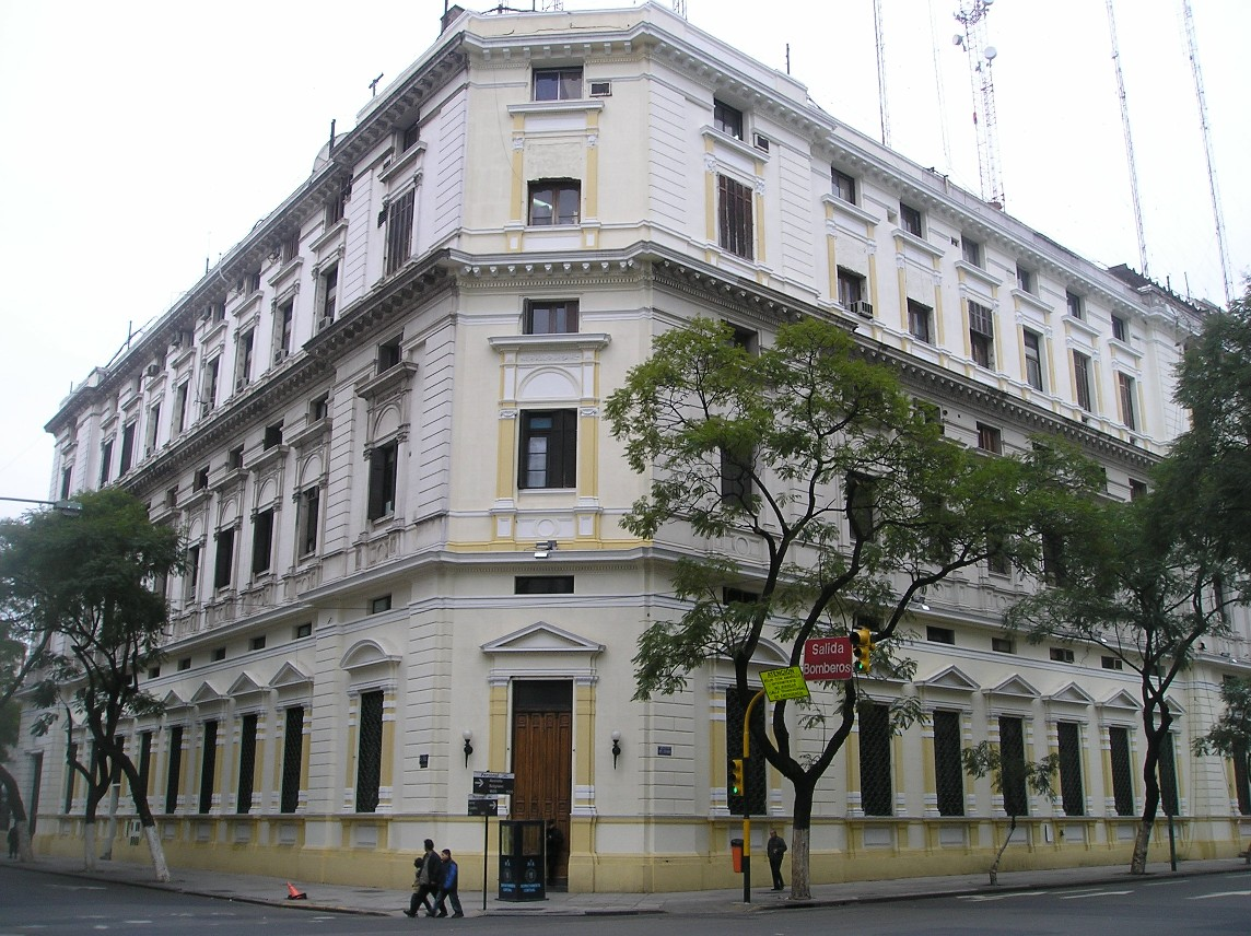 Cuartel de Policía. Monserrat. Buenos Aires. Argentina